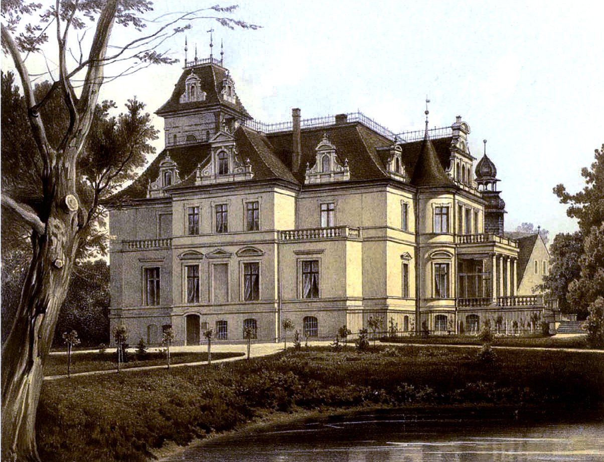 Rittergut Schwengfeld, Kreis Schweidnitz